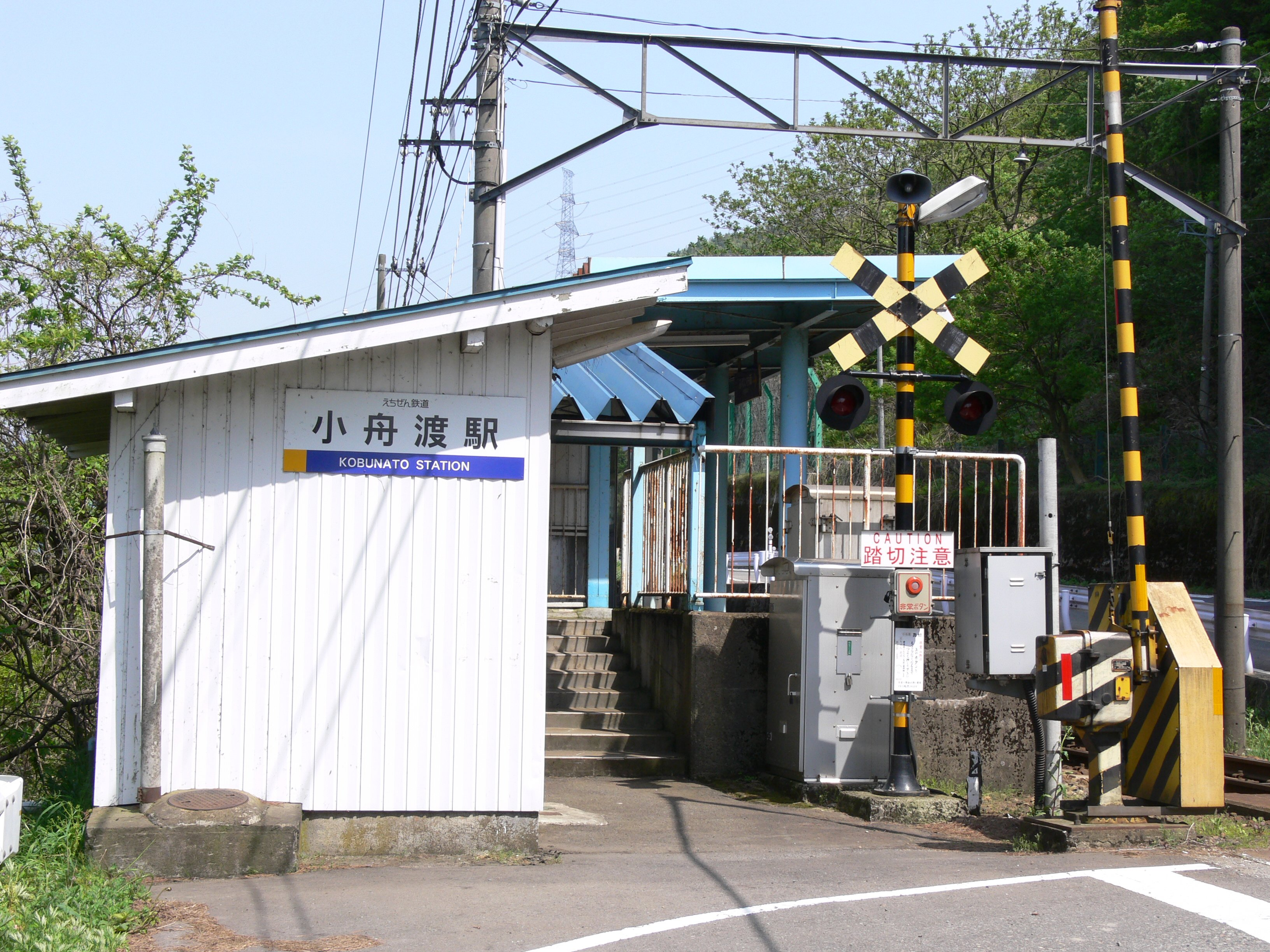 Kobunato Station